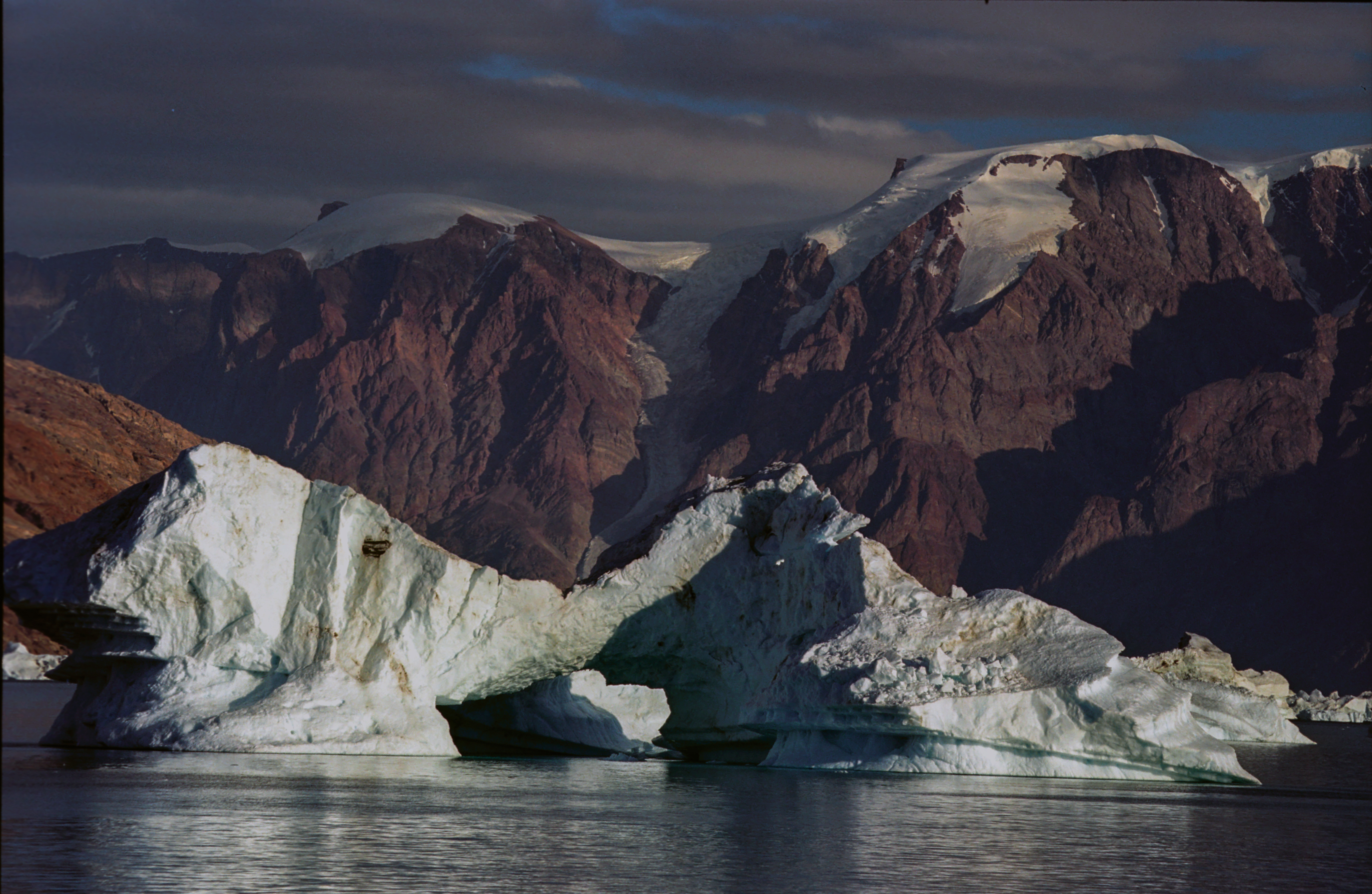 Greenland, Rype Fjord, Iceberg